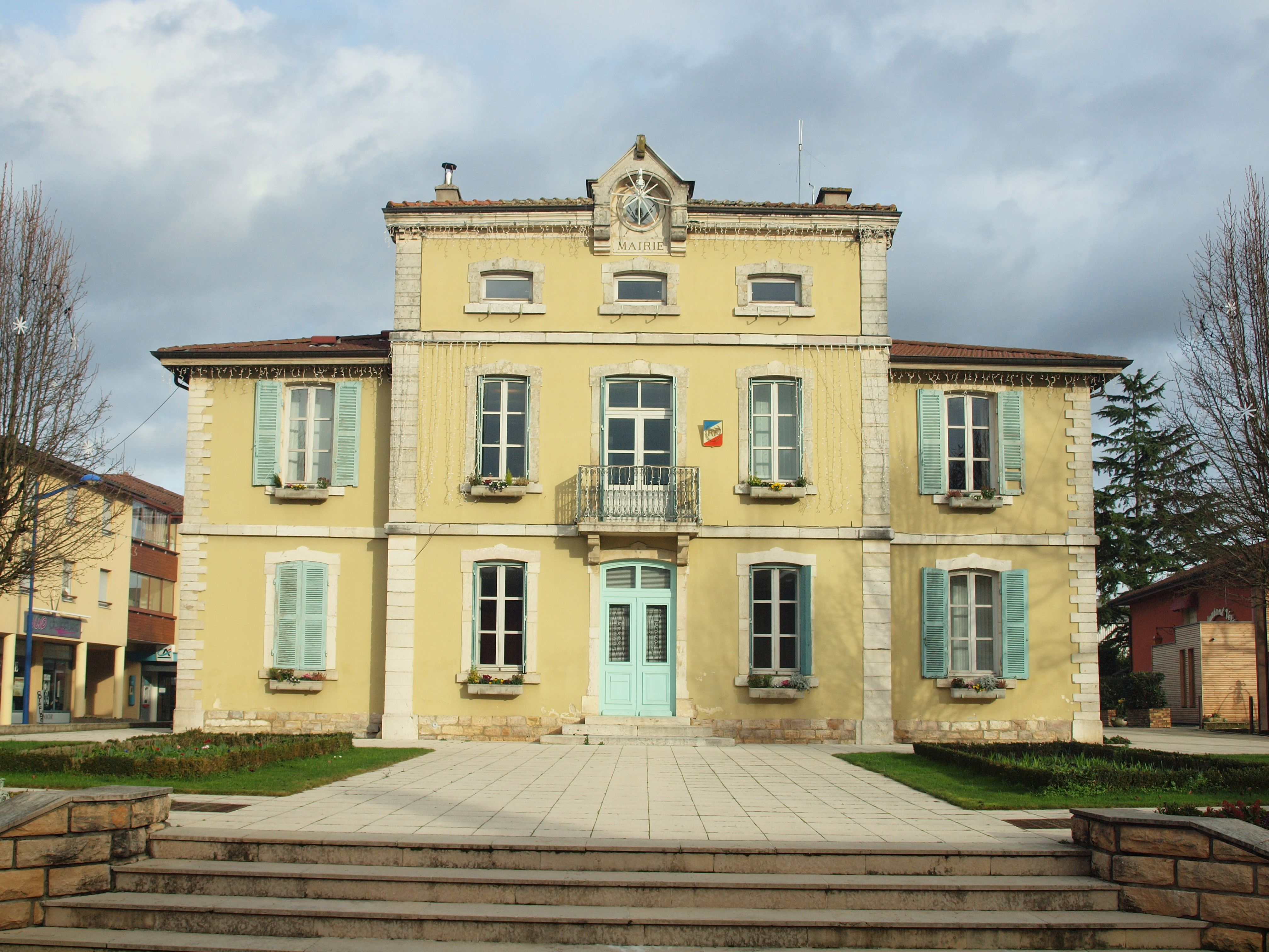 Mairie de Viriat (Ain, France)